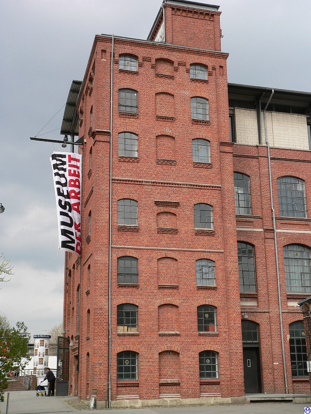 Museum der Arbeit in Hamburg-Barmbek (22.4.2005)This is a photograph of an architectural monument.